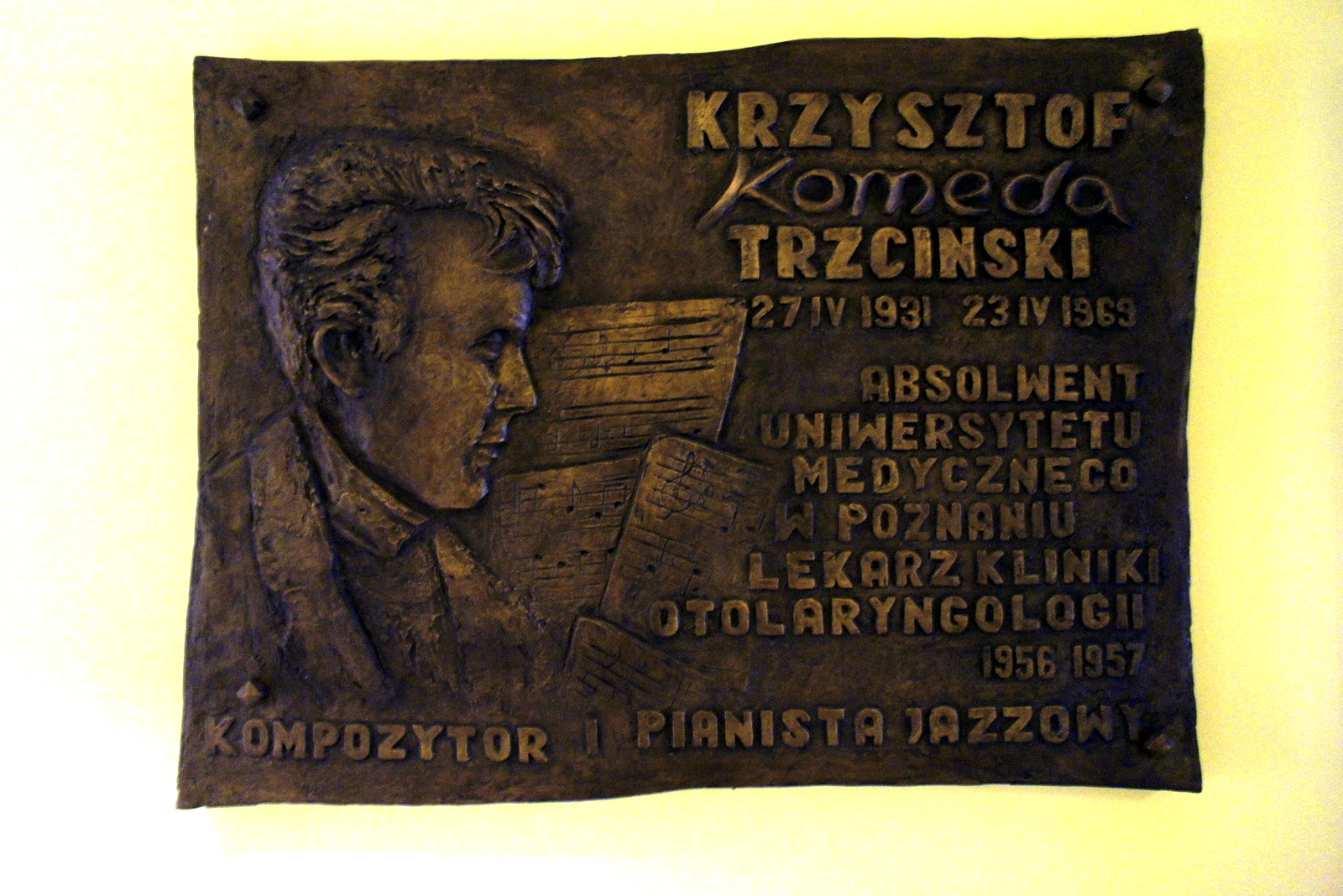 Tablica pamiątkowa na Oddziale Klinicznym Foniatrii i Audiologii w Szpitalu Klinicznym UM w Poznaniu, ul. Przybyszewskiego. W 1956 r. młody lekarz Krzysztof Trzciński zostaje asystentem w Klinice Laryngologii, zaangażowany został przez wybitnego otolaryngologa prof. Aleksandra Zakrzewskiego. W 1957 r. składa wymówienie i już całkowicie oddaje się jazzowi.